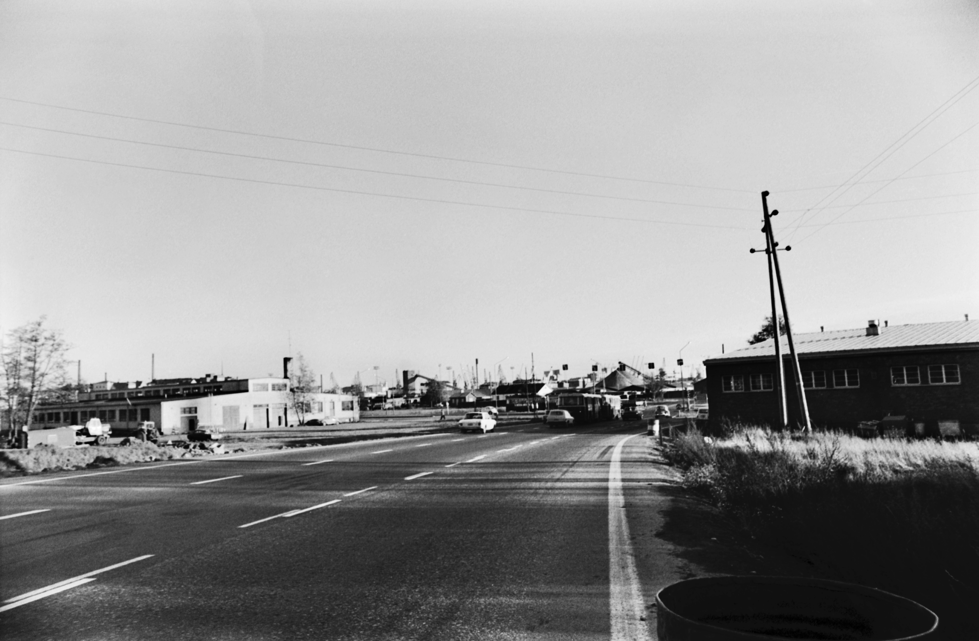 Länsiväylä. Näkymä Länsiväylän Porkkalankadun puoleisesta päästä kaakkoon. Vasemmalla asunnottomien yömajana toiminut entinen varastorakennus, Lepakkoluola, keskellä Porkkalankadun ja Itämerenkadun välillä olevaa pienteollisuusaluetta.